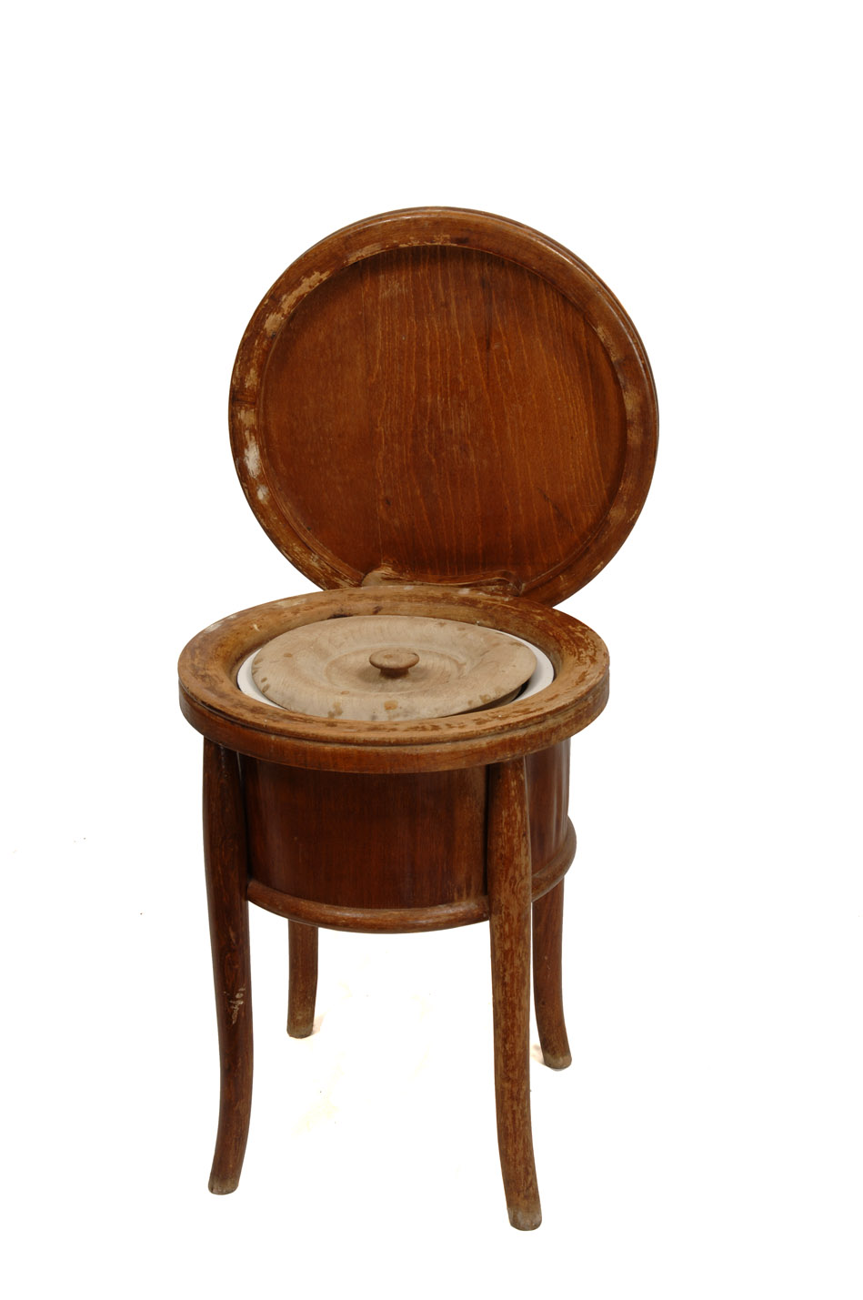 Fotografies dels objectes de l'exposició permanent de la sala "Secà i Muntanya" del Museu Valencià d'Etnologia - Fotografies de Mateo Gamon.